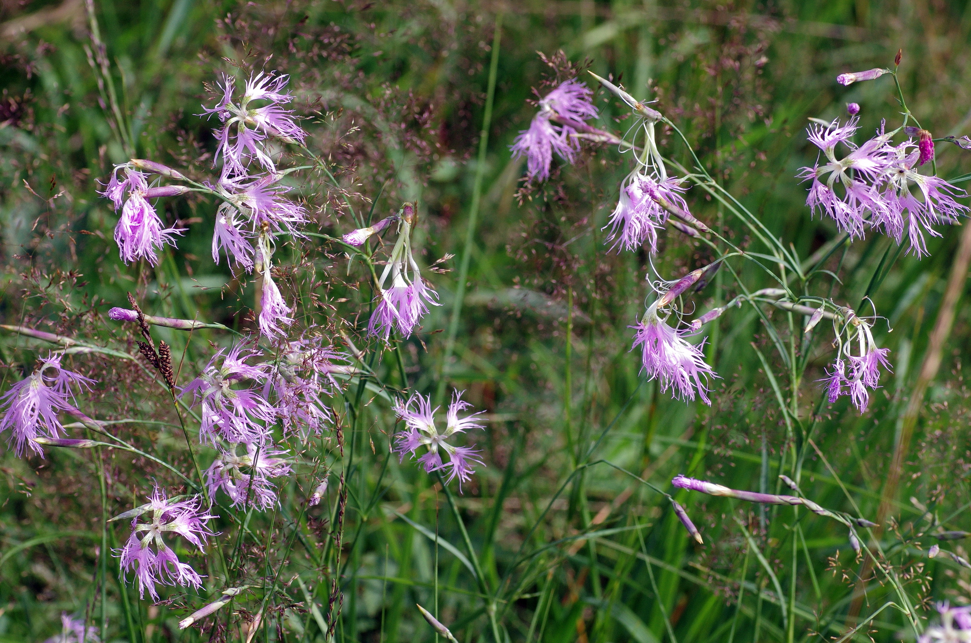 Přírodní rezervace Mokřady pod Vlčkem, hvozdík pyšný, Slavkovský les, okres Cheb